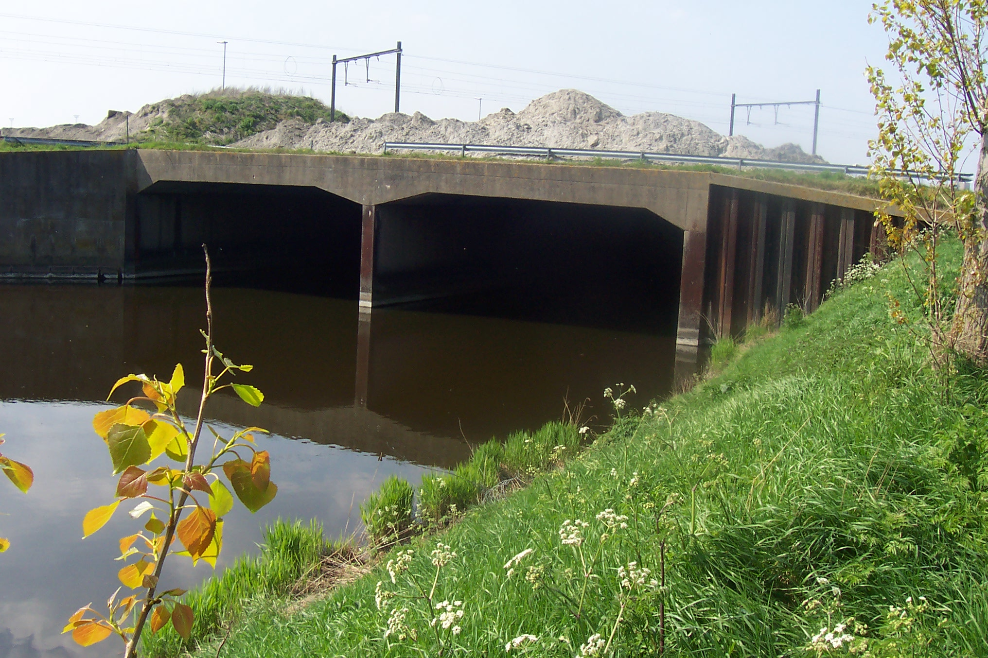 Het Leopoldkanaal te Zeebrugge